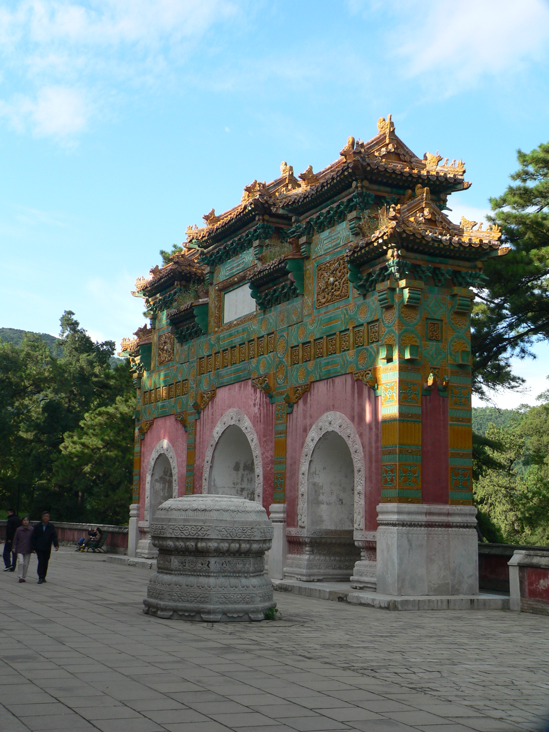 香山公园内昭庙前的琉璃牌坊